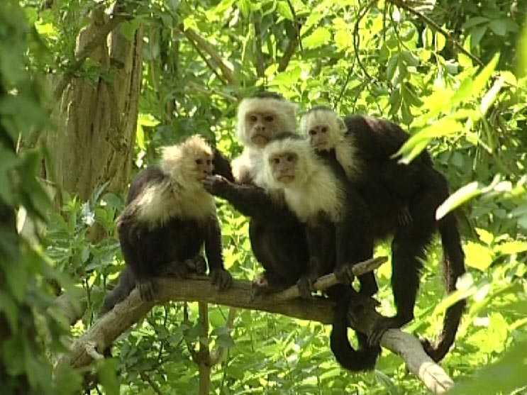 Une interaction sociale dans un groupe de capucins moines Cebus capucinus